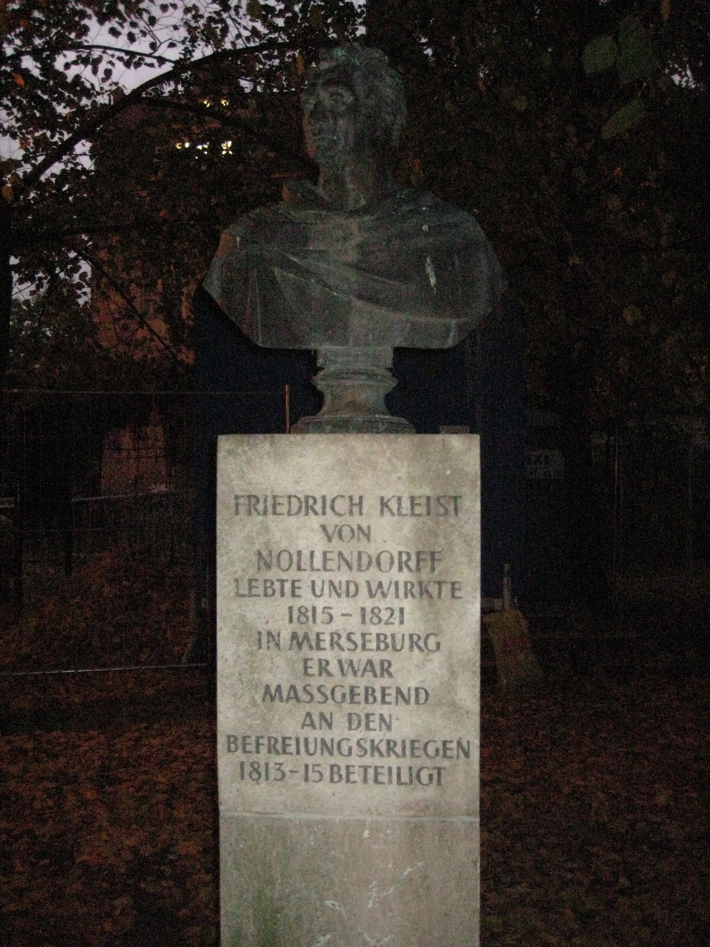 Büste von Friedrich Kleist von Nollendorff im Schloßpark von Merseburg